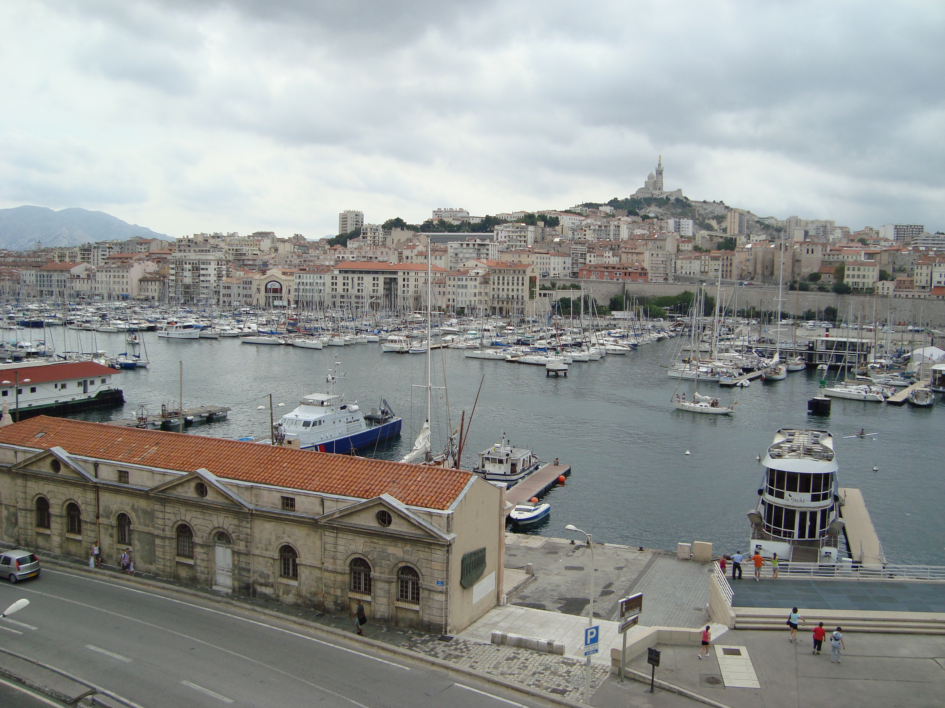 Marseille